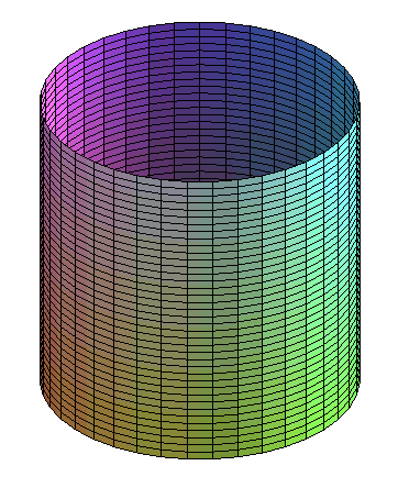 Un cylindre : exemple de surface réglée